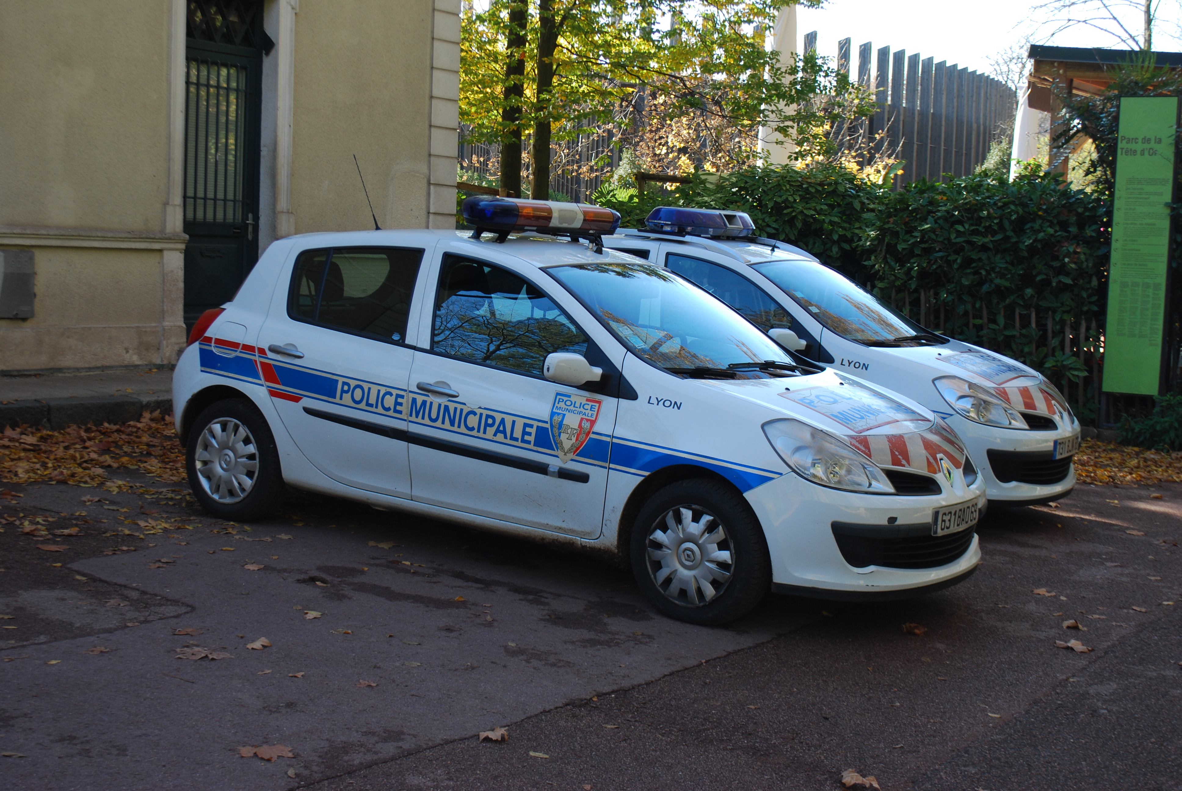 Vue du parc de la Tête d'Or, à Lyon.